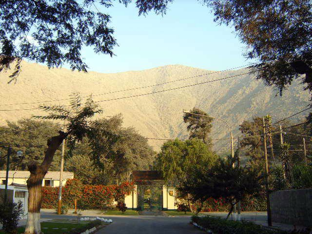 Club Terrazas de Chaclacayo Fuente: Nestor Ulaf Salcedo Zuta. Coleccion personal. Junio 2006